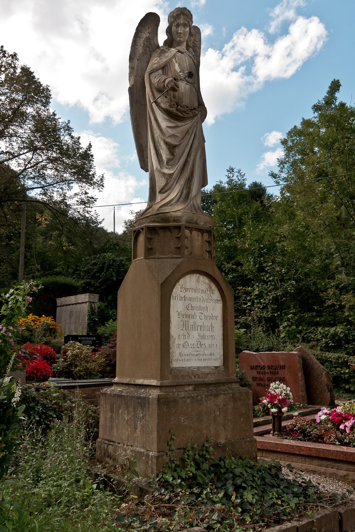 Rösrath, Denkmalnummer 65, Müllenbach-Grabmal, Christoph Heinrich vor der Renovierung im Jahr 2013. Bildhauer: F. Custodis This is a photograph of an architectural monument.